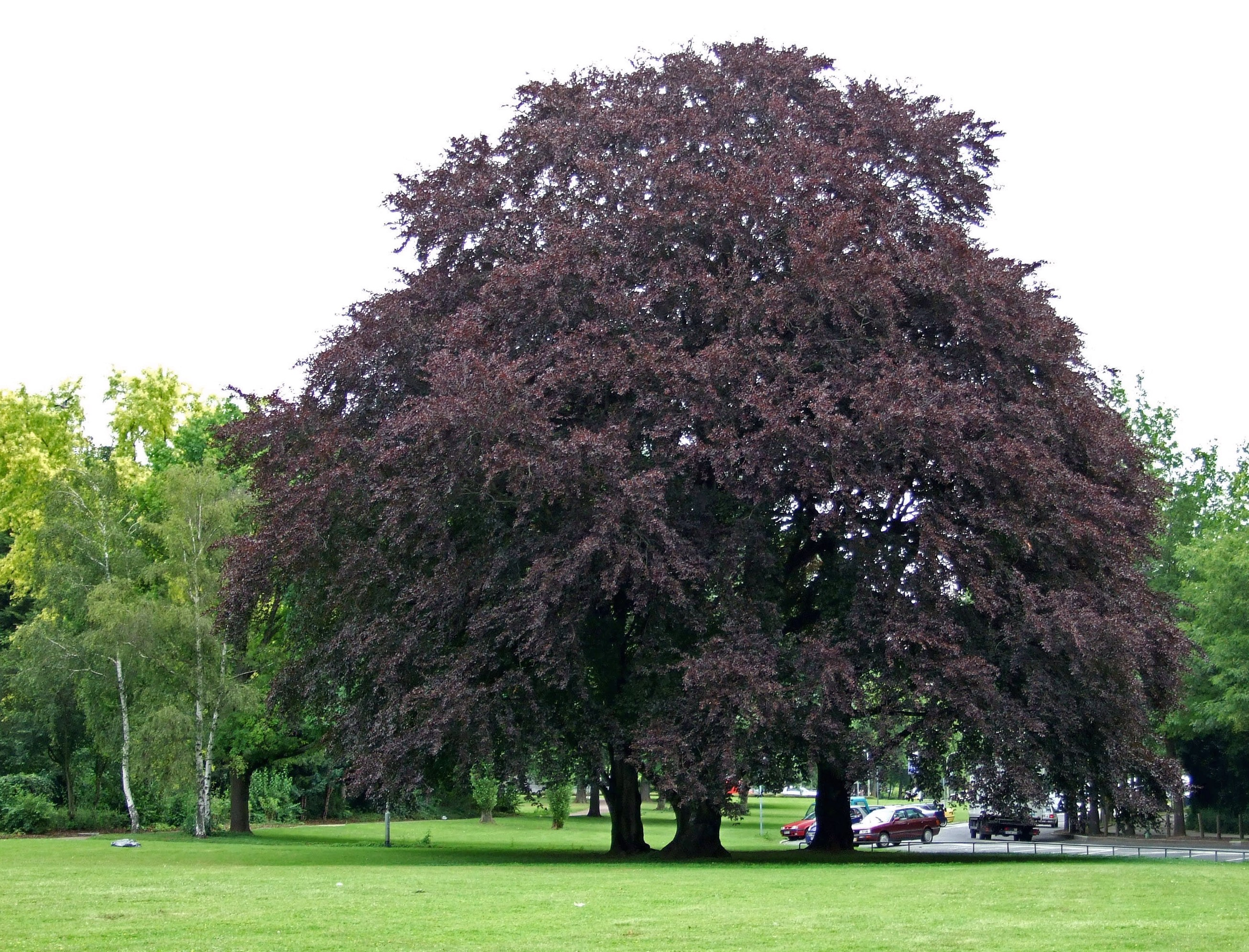 Blutbuchengruppe an der Ostparkstrasse in Ffm